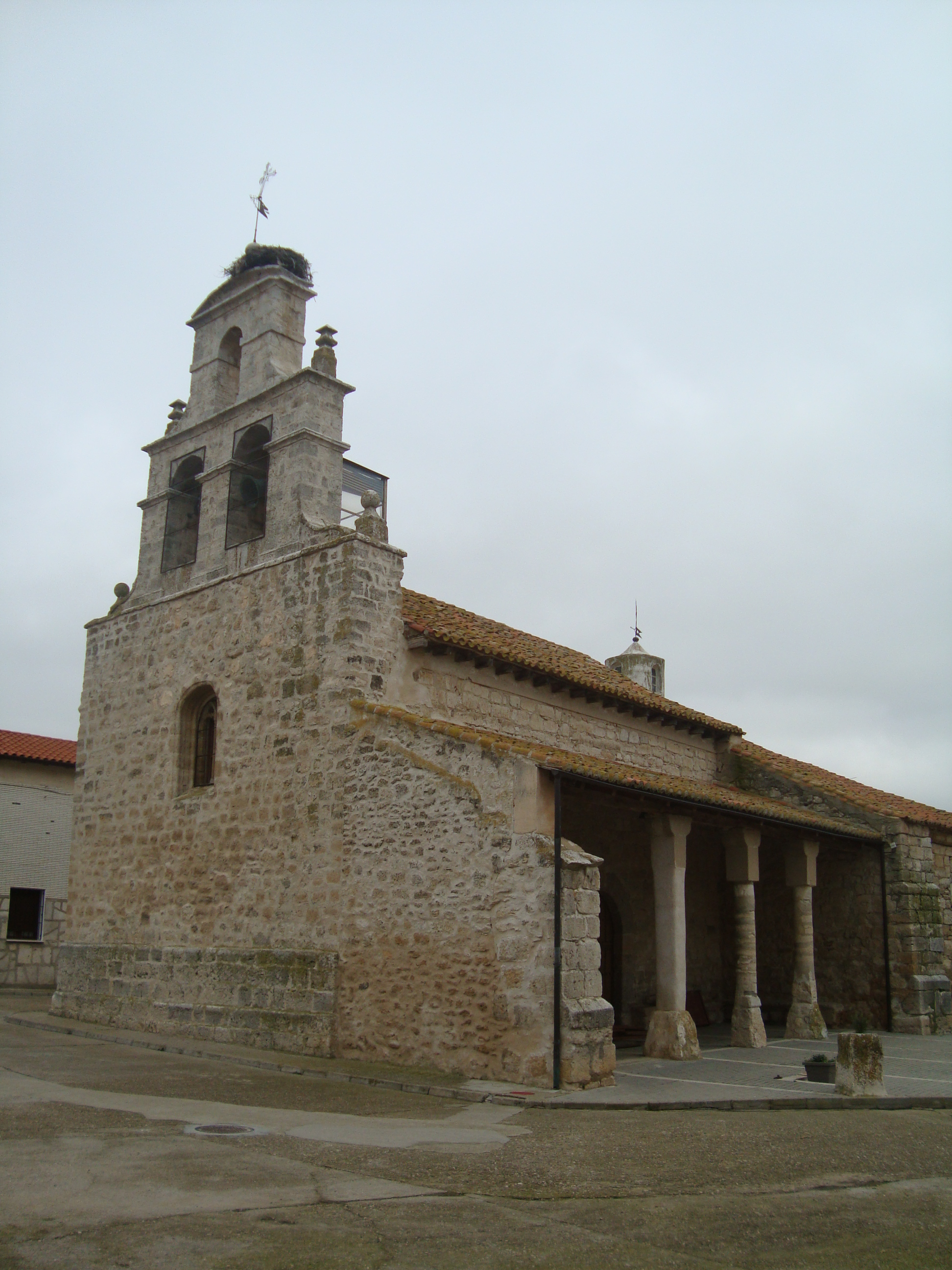 Iglesia de Nuestra Señora de la Asunción en Robladillo (Valladolid).